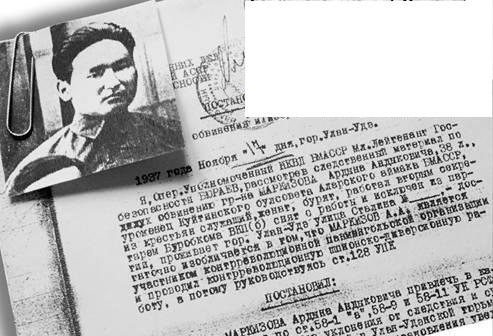 Страница из дела Ардана Маркизова